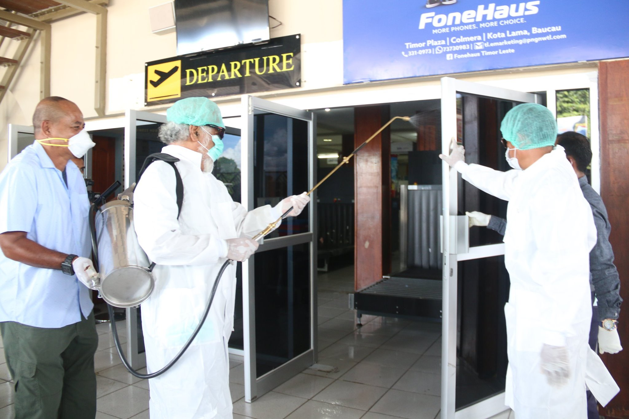 Desinfektionsaktion am Flughafen Dili